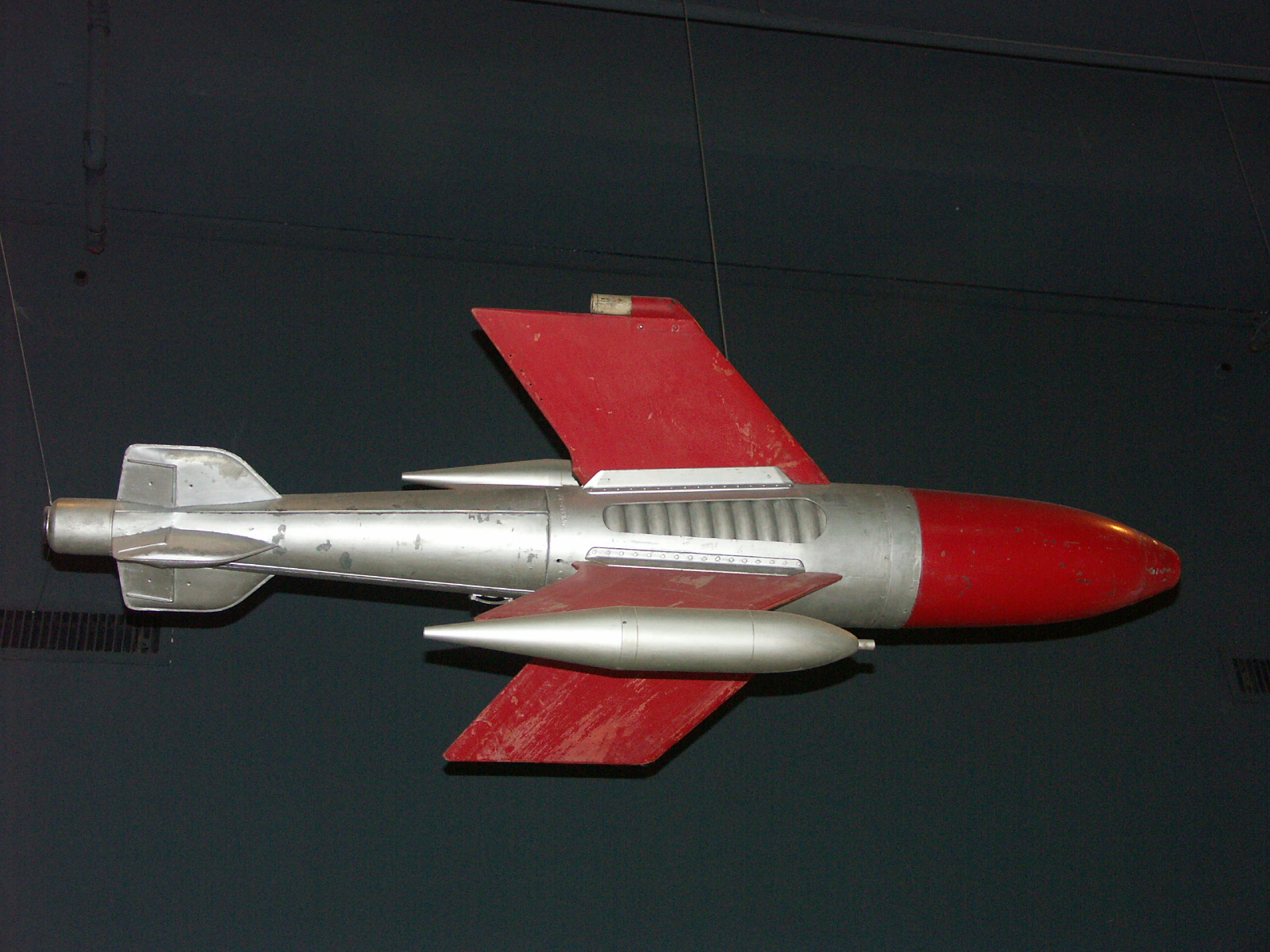 Deutsches Museum photo par Jean-Patrick Donzey